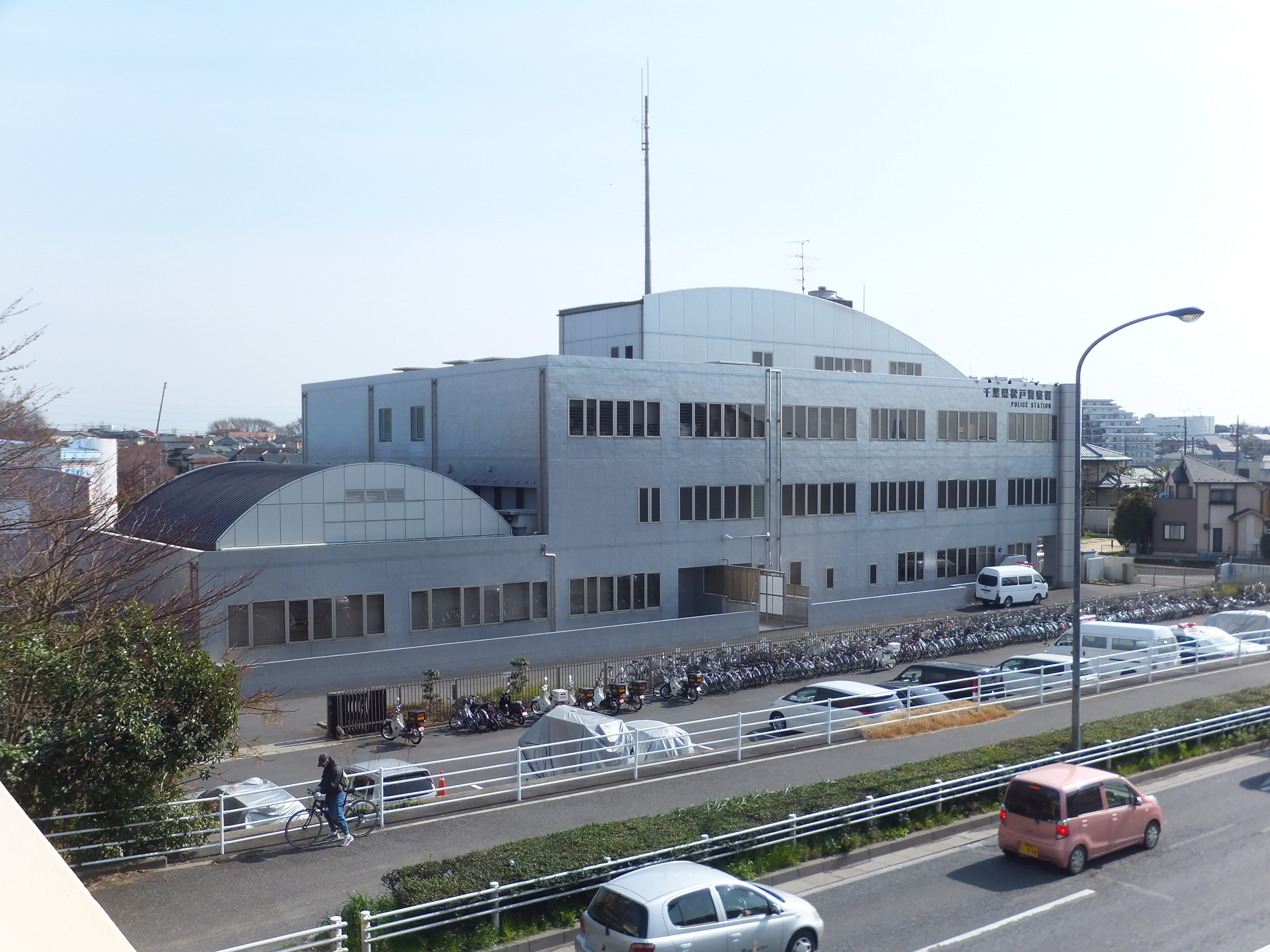 松戸警察署